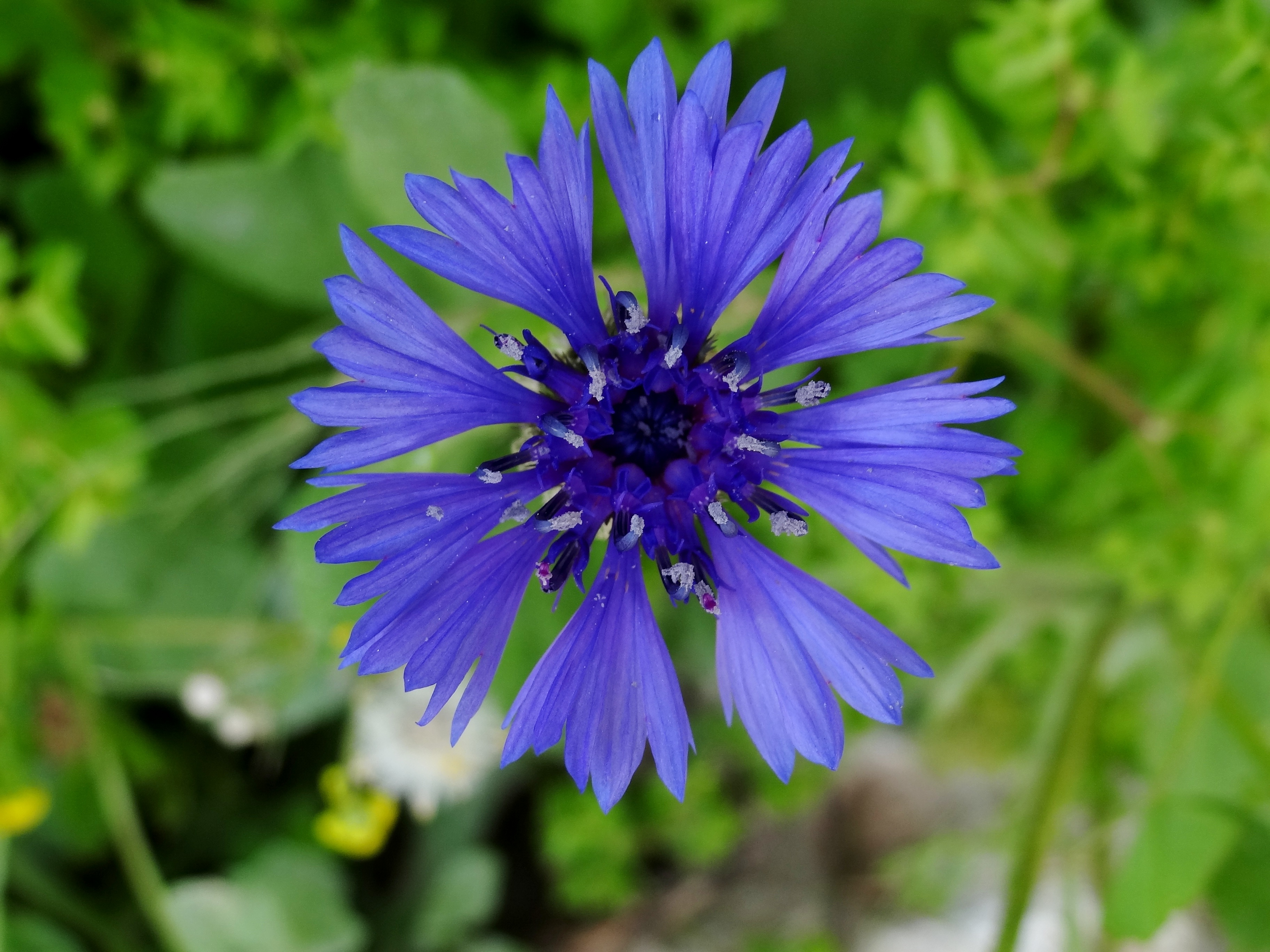 דַּרְדַּר כָּחֹל (המכונה Syrian Cornflower-thistle, Knapweed; שם מדעי: Centaurea cyanoides) הוא צמח חד-שנתי ממשפחת המורכבים. צבעי הפרחים מהסוג דַּרְדַּר משותפים לאבקנים ולעלי הכותרת. לזרעונים חסרה "ציצית" - המופיעה בצמחים אחרים ממשפחה זו. הציצית היא קבוצת שערות או מוצים ארוכים בראש הזרעונים התורמים להסעתם. בניגוד לכמה מינים אחרים בסוג דרדר, שחפי המעטפת שלהם קוצניים, הדרדר הכחול אינו קוצני. הדרדר הכחול הוא מין אנדמי לארץ ישראל, ירדן, סוריה, לבנון וקפריסין[1]. הוא גדל בבתה בשפלה המרכזית ובהר ופורח בין החודשים פברואר לאפריל.